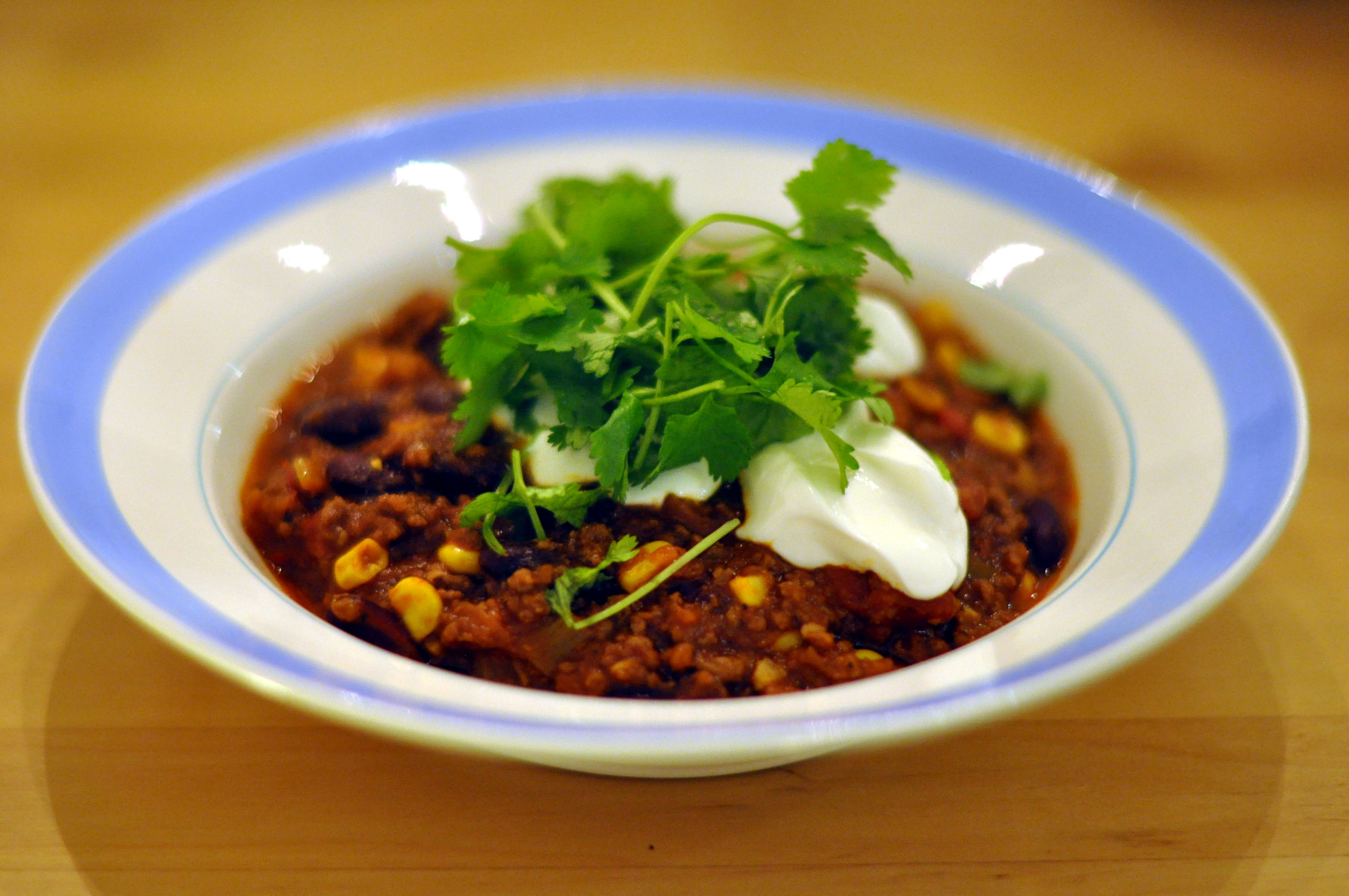 Chili con carne